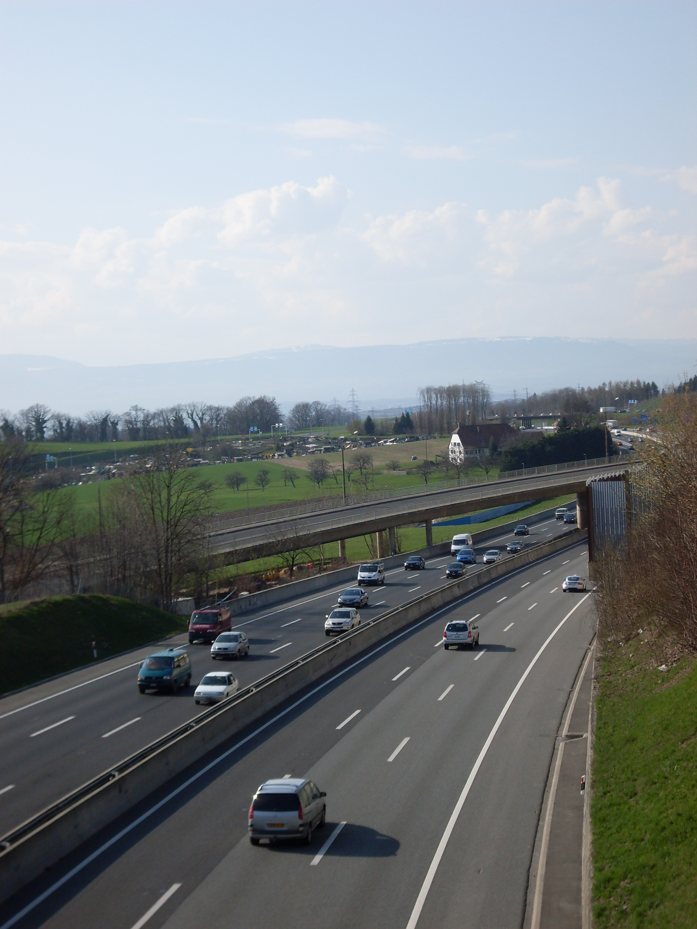 autoroute vers le quartier de la Blécherette, Lausanne, Vaud,Suisse